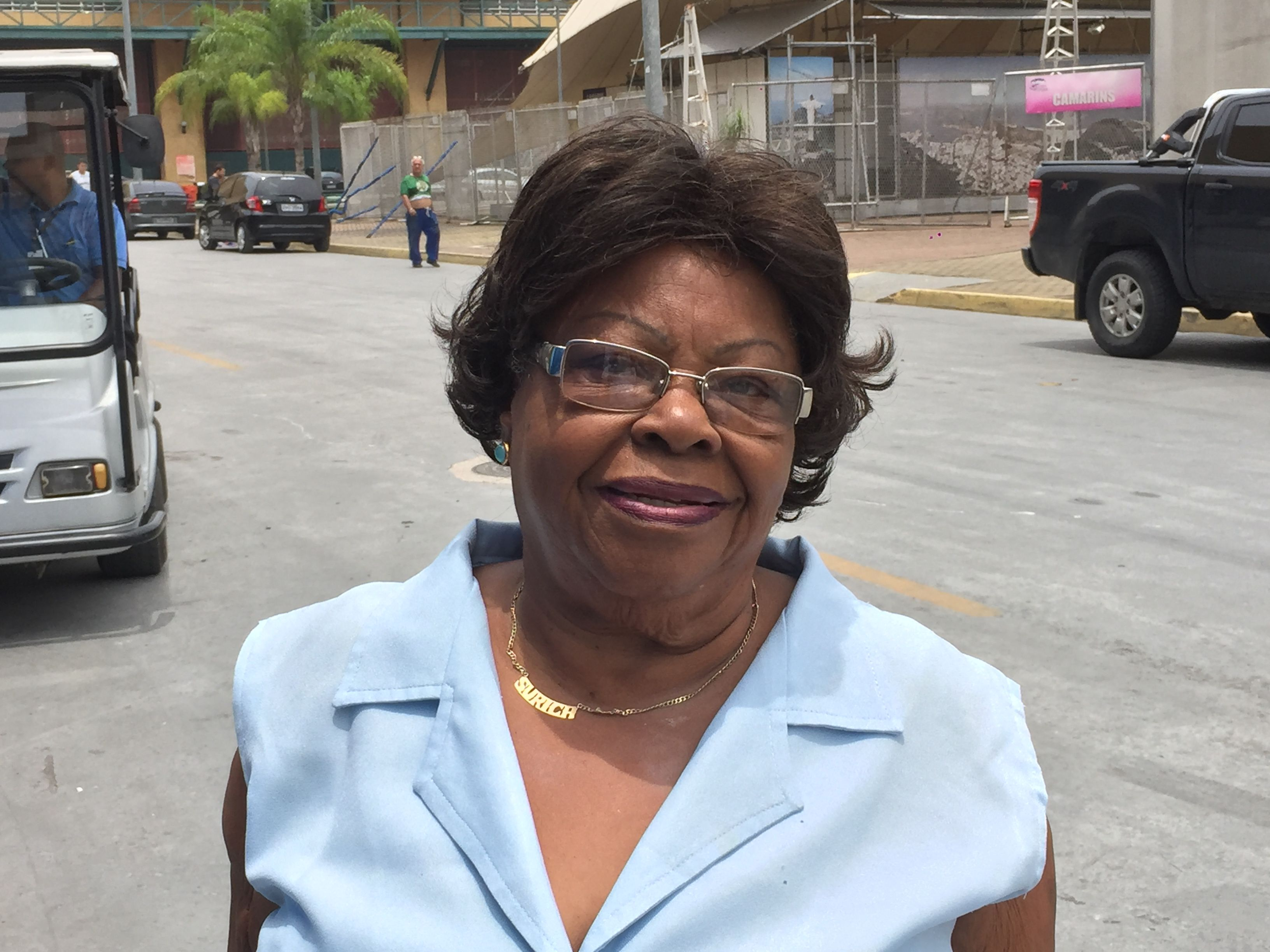 Rio de Janeiro - A integrante da Velha Guarda da Portela Tia Surica apoia o carnavalesco Paulo Barros na modernidade no desenvolvimento do enredo (Cristina Índio do Brasil/Agência Brasil)